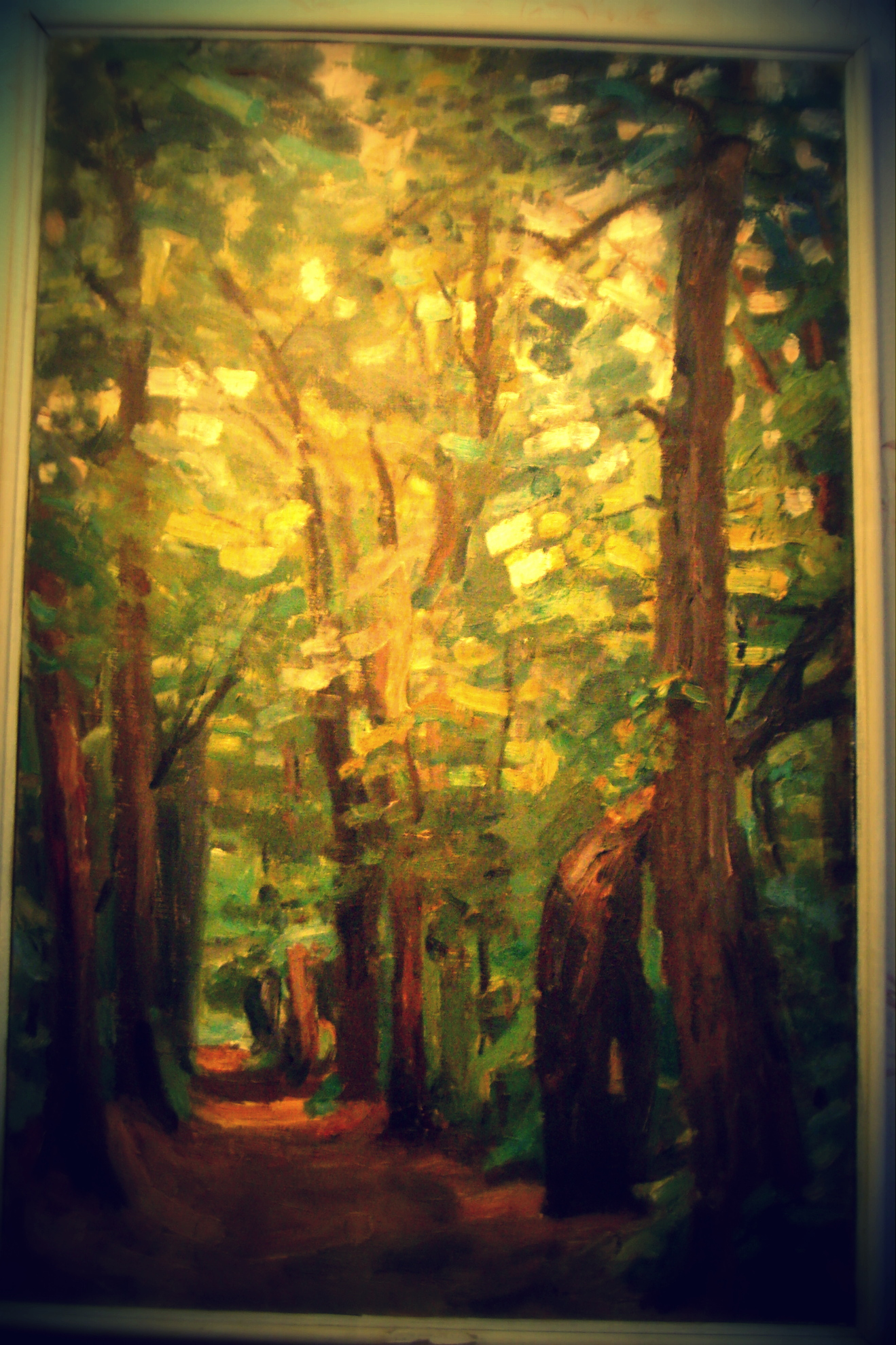 Роща в Богородицком парке